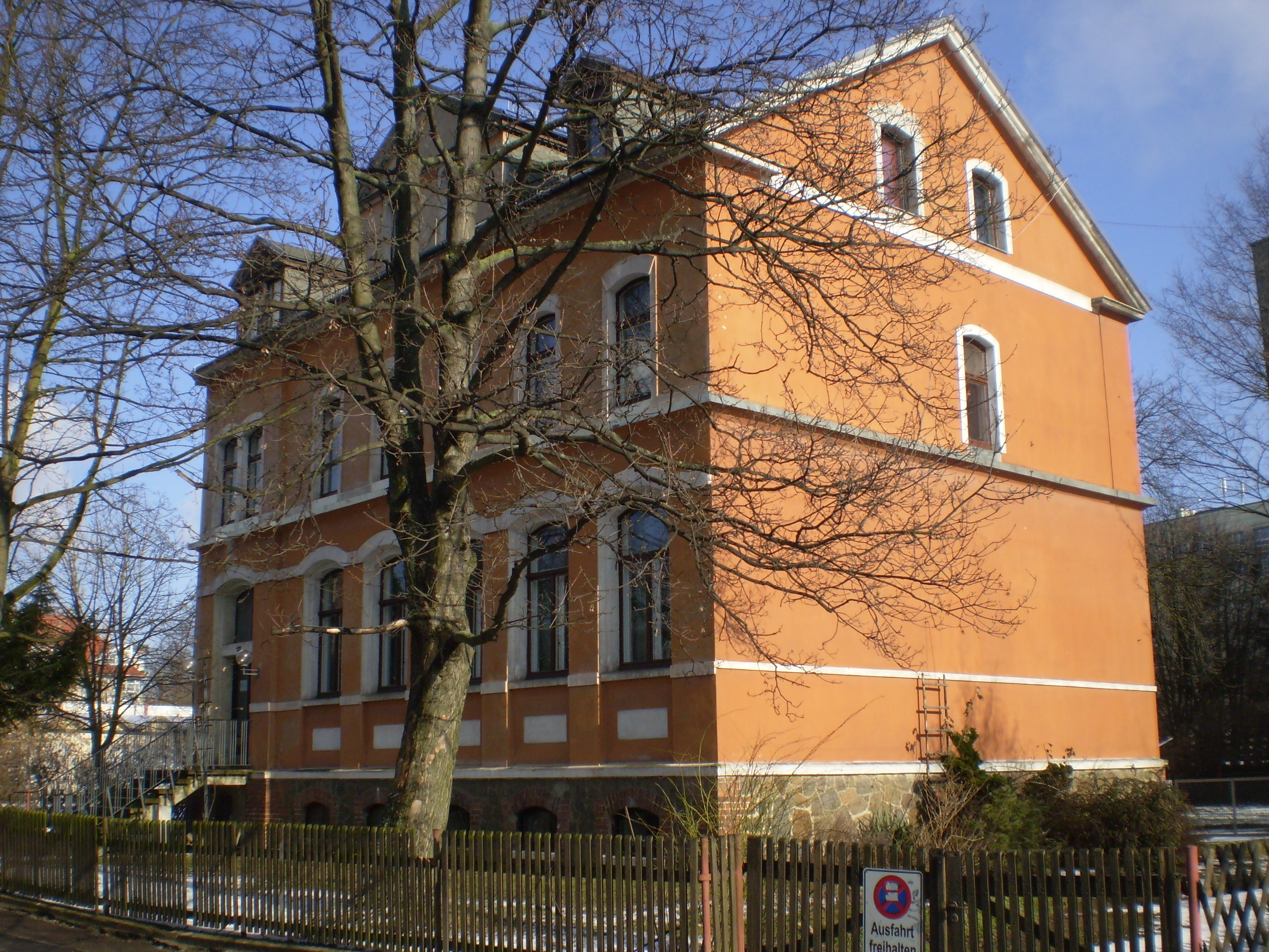 Pfarrhaus in Leipzig-Lößnig an der Bornaischen Straße, ehemalige Dorfschule Lößnig